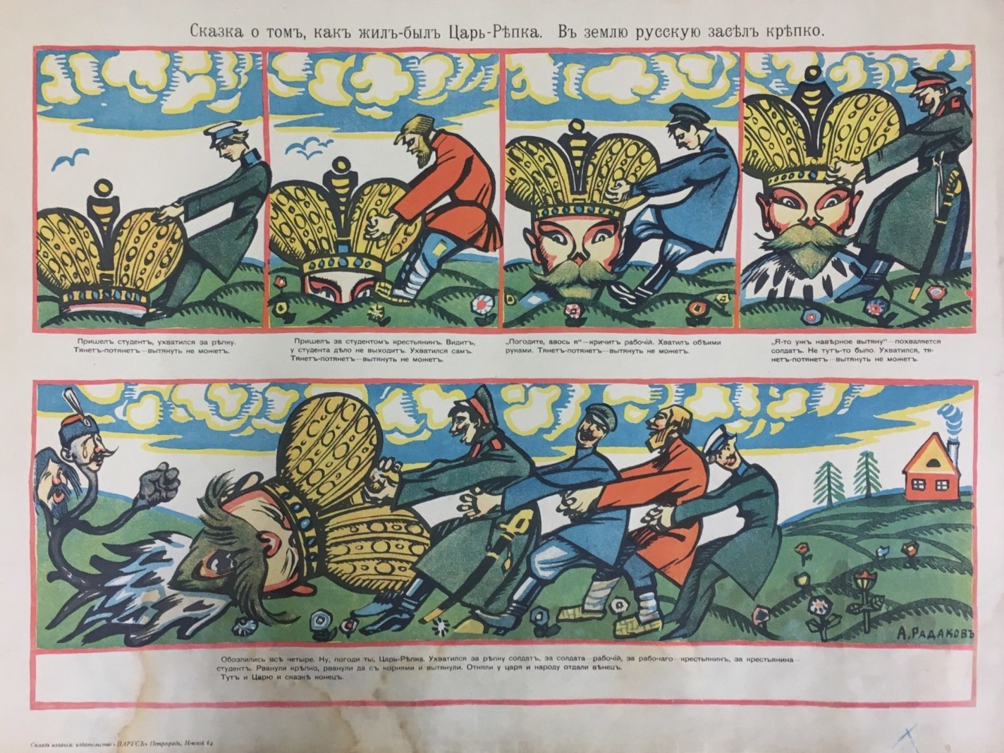 1917. Сказка о томъ, какъ жилъ-былъ Царь-Ръпка. В землю русскую засълъ кръпко.jpg